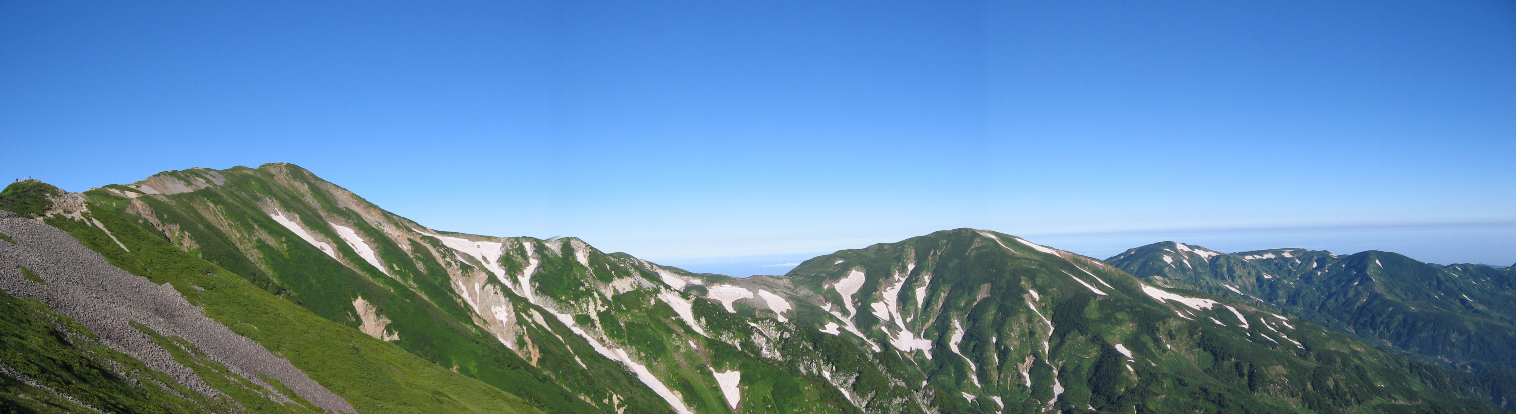 小蓮華山の東の尾根から西の眺望。左から小蓮華山、雪倉岳、朝日岳(右奥)。